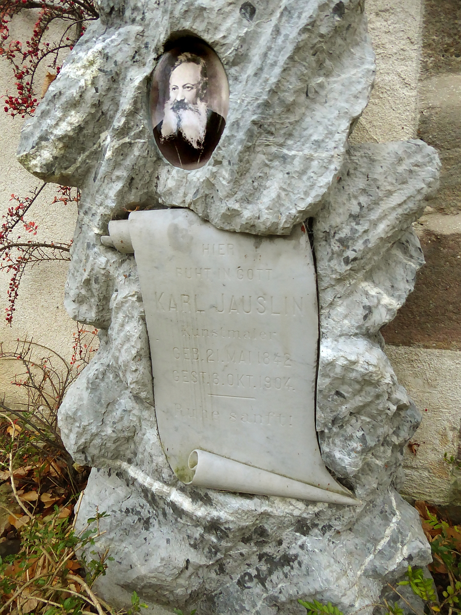 Karl Jauslin (1842–1904) Kunstmaler, Illustrator, Grabmal innerhalb der Ringmauer der Wehrkirche St. Arbogast in Muttenz, Basel-Landschaft